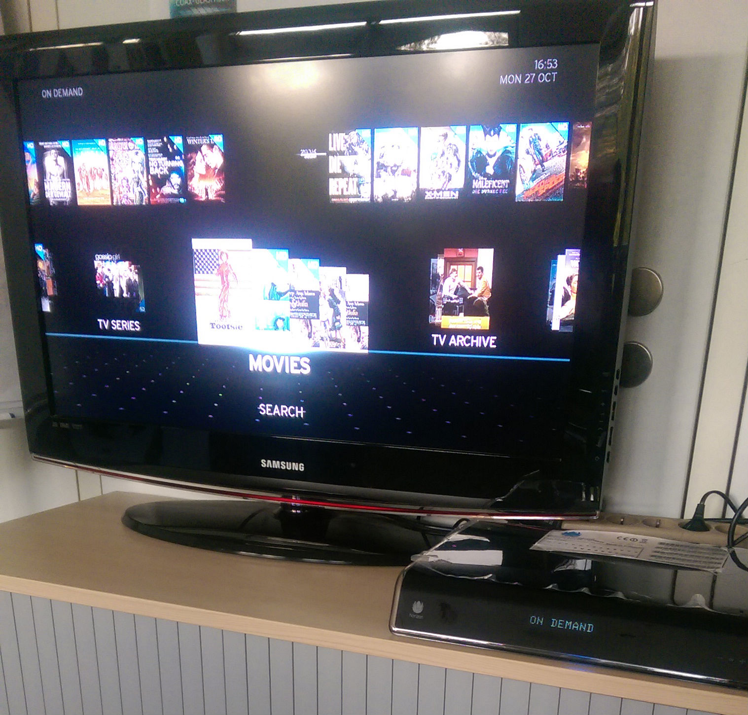 Horizon HD Recorder von Unitymedia mit Video on Demand